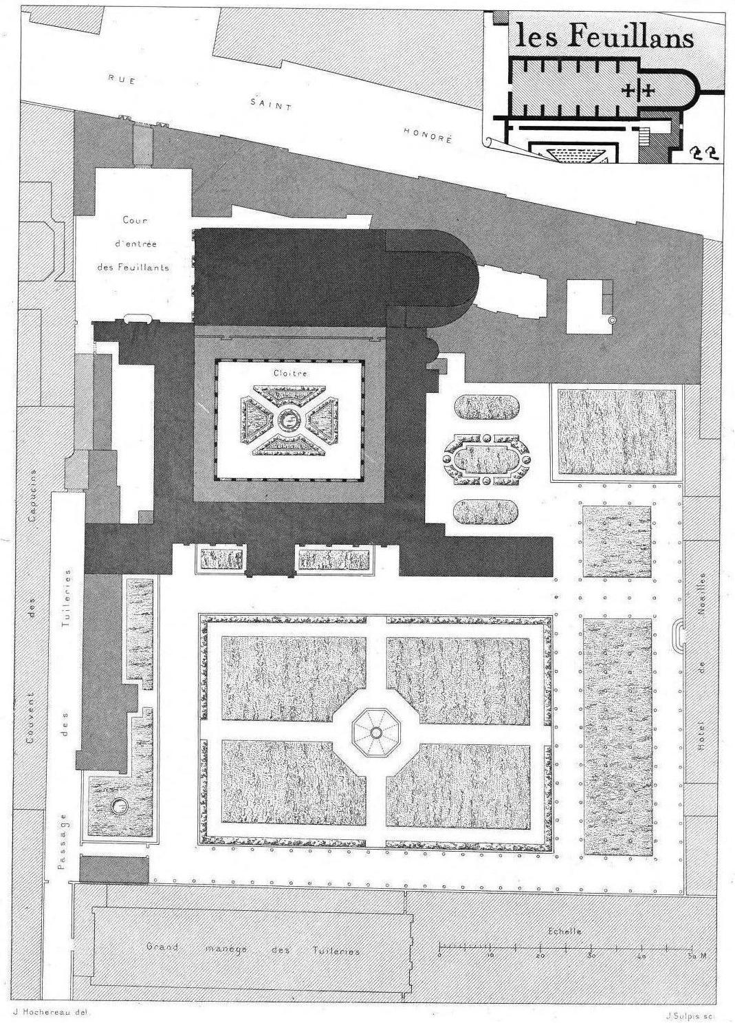 "Plan du couvent des Feuillants du faubourg Saint-Honoré".